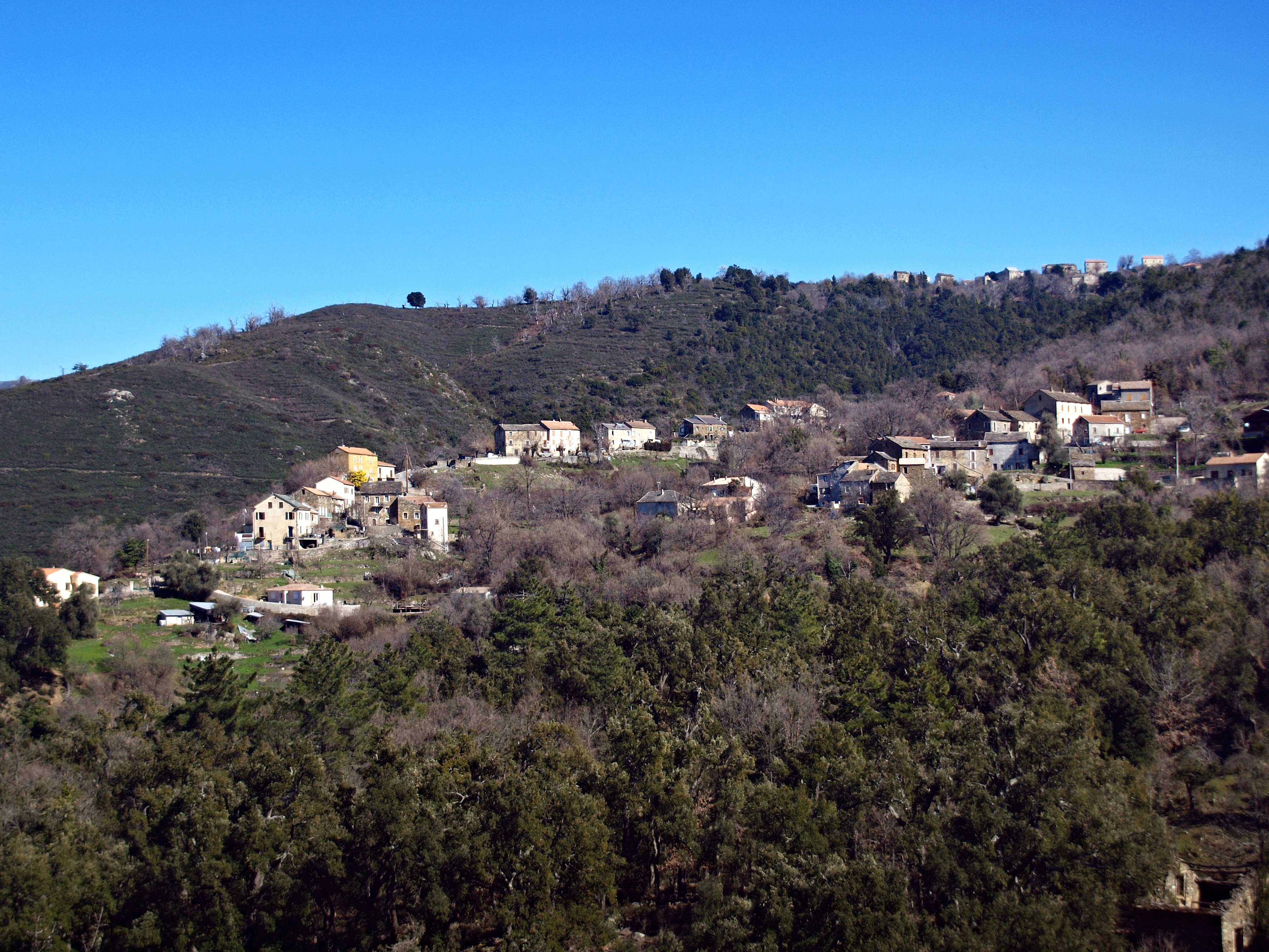 Corsu: E Valle di Rustinu, Rustinu (Corsica)